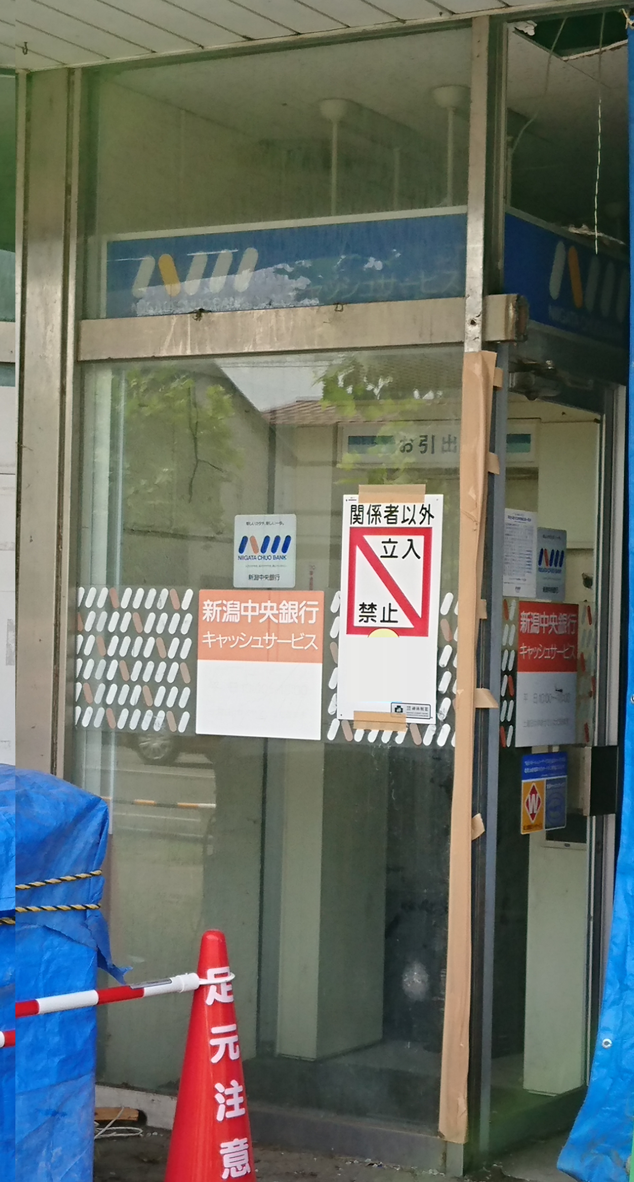 新潟中央銀行のATMコーナー（新潟県五泉市）